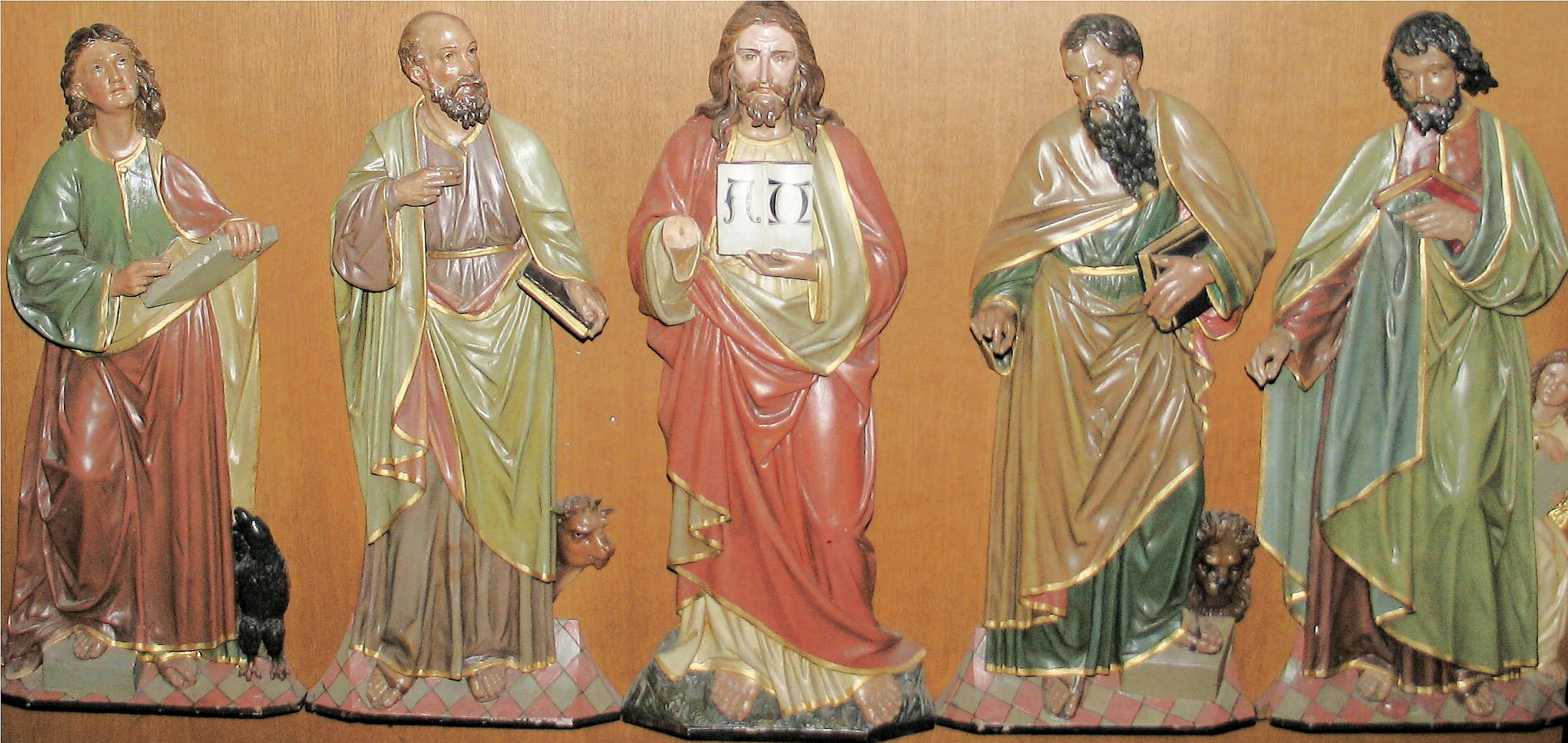 Detail op engem Altor an der Kierch zu Beetebuerg